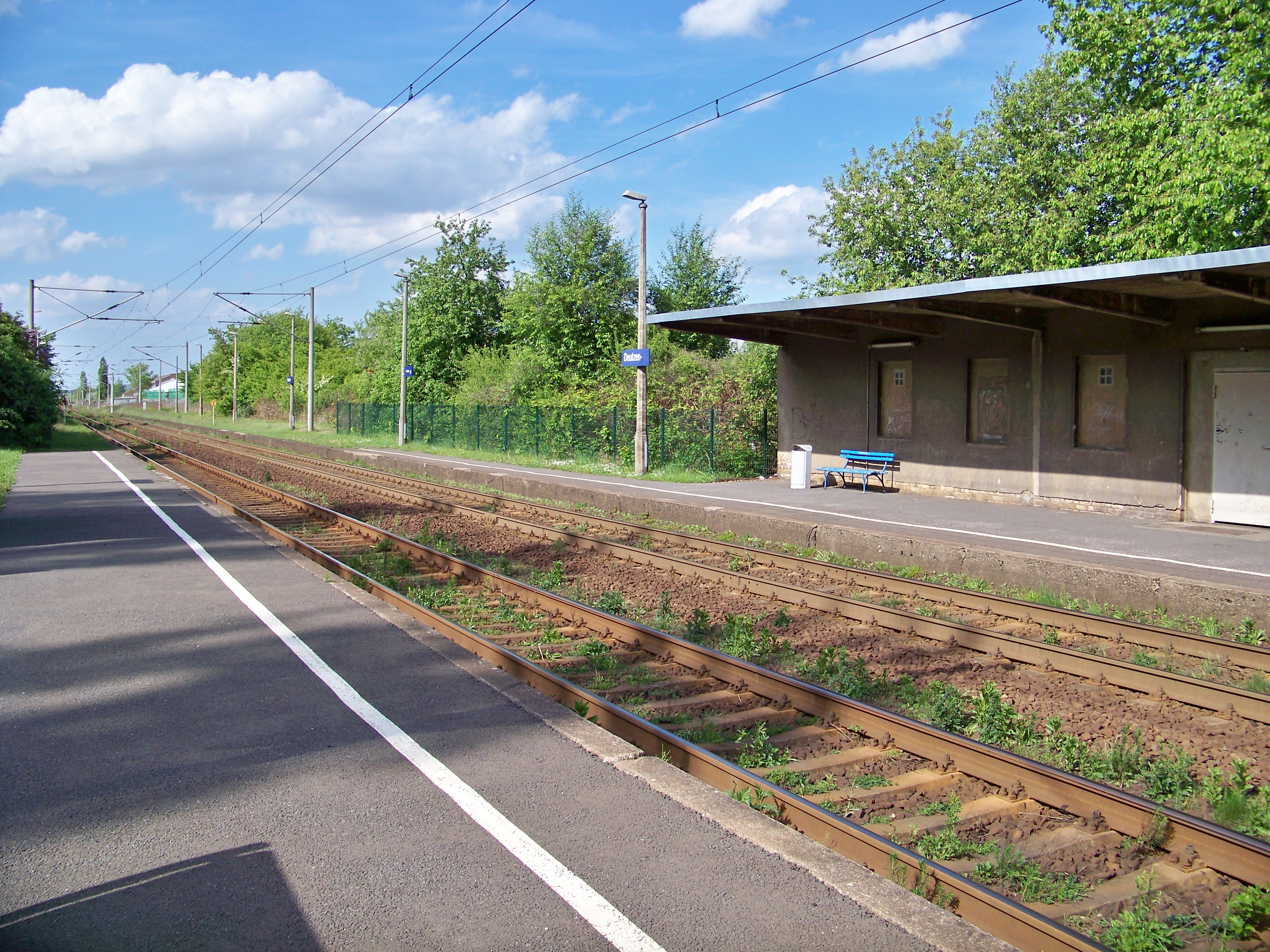 Haltepunkt Deutzen in Sachsen/Landkreis Leipziger Land